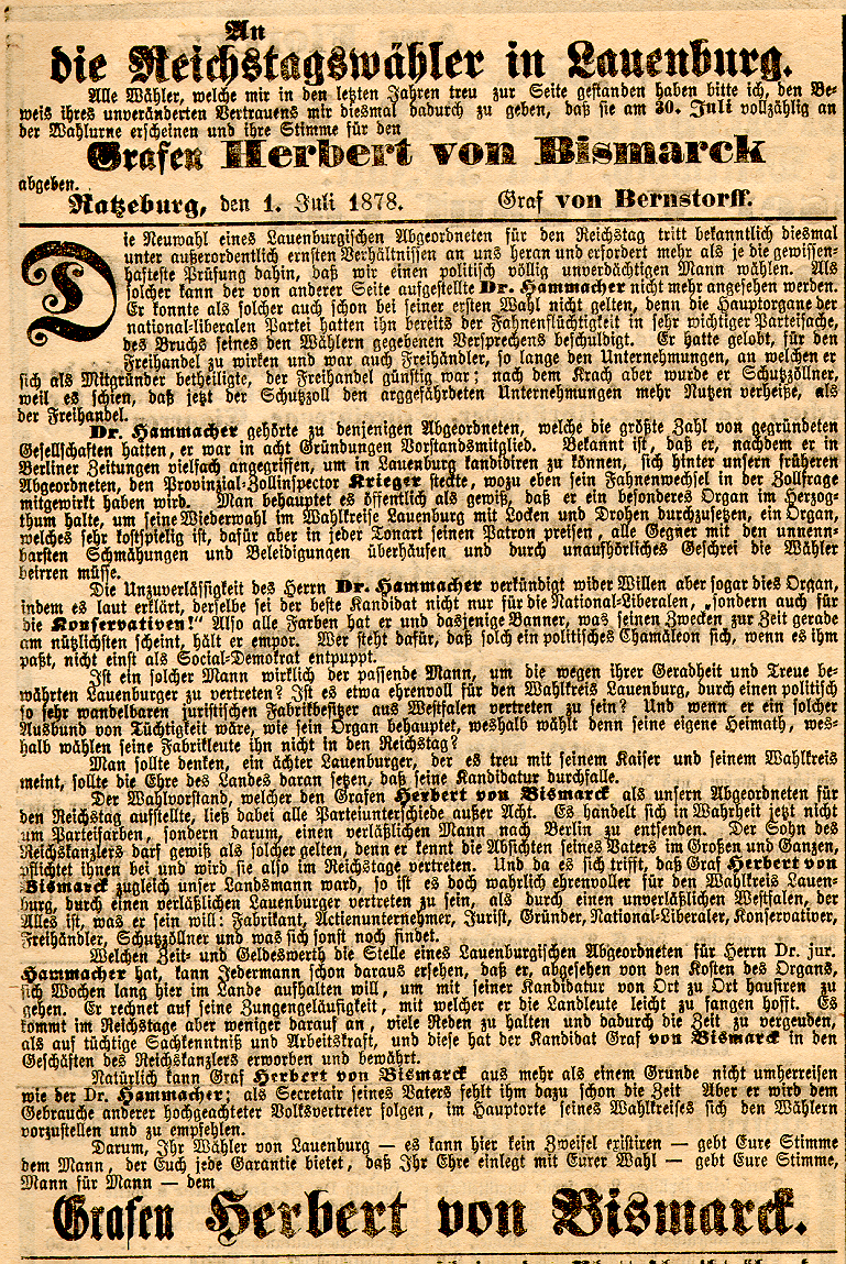 Reichstagswahlen 1878 in Lauenburg, Wahlreklame Herbert von Bismarck.